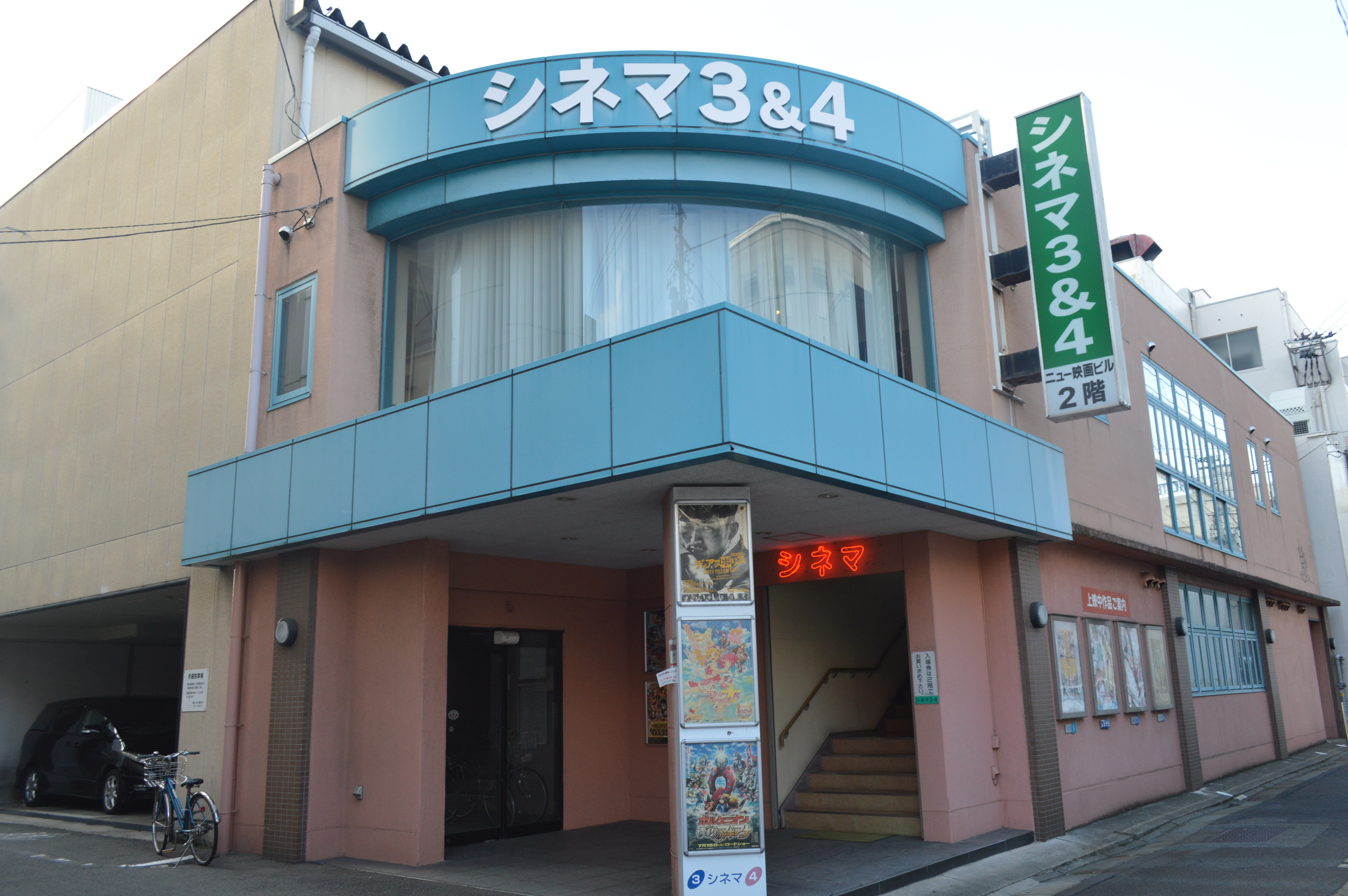 福井市にある映画館「福井シネマ3・4」（別館）。